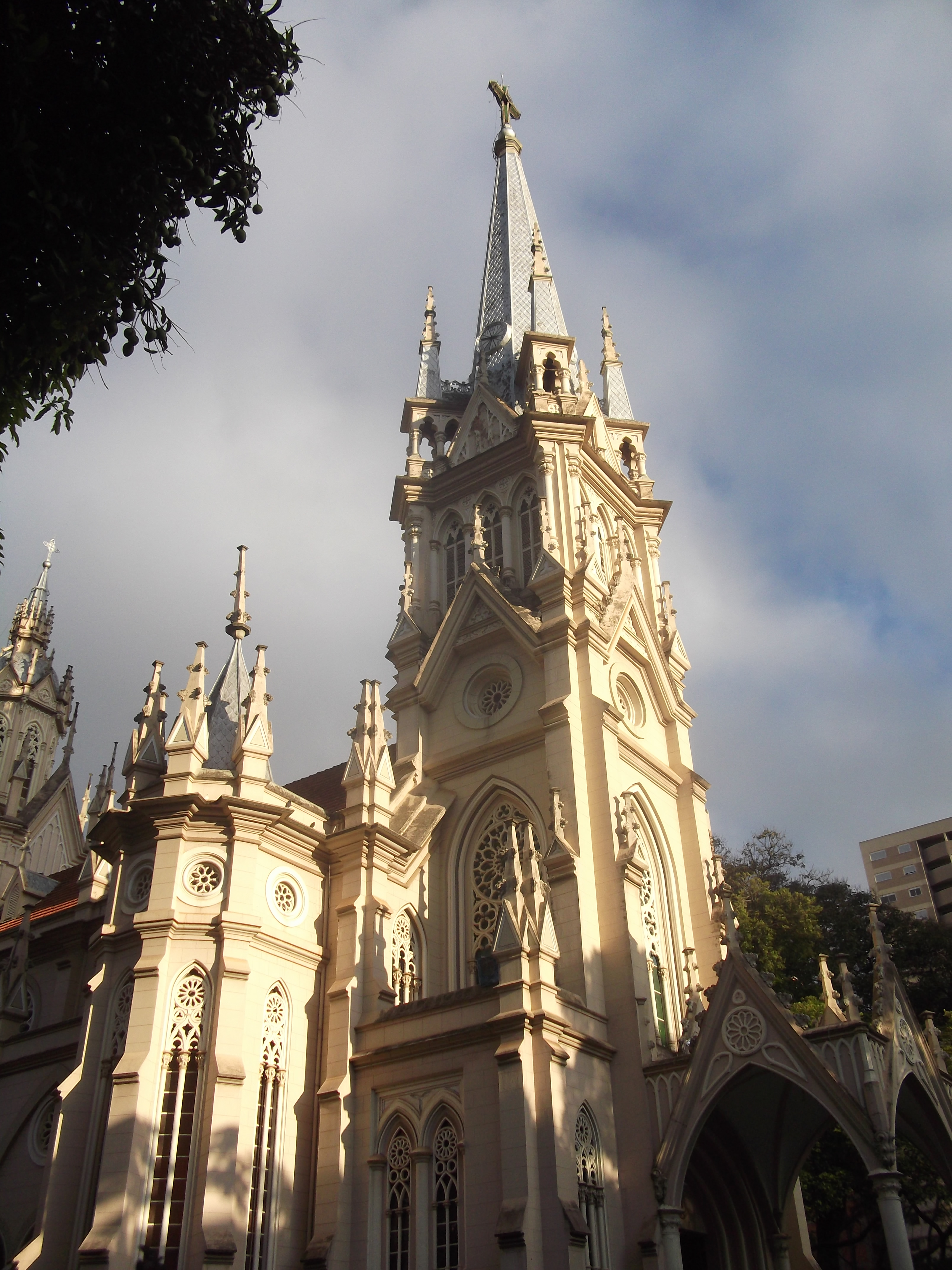 Catedral da Boa Viagem, Belo Horizonte